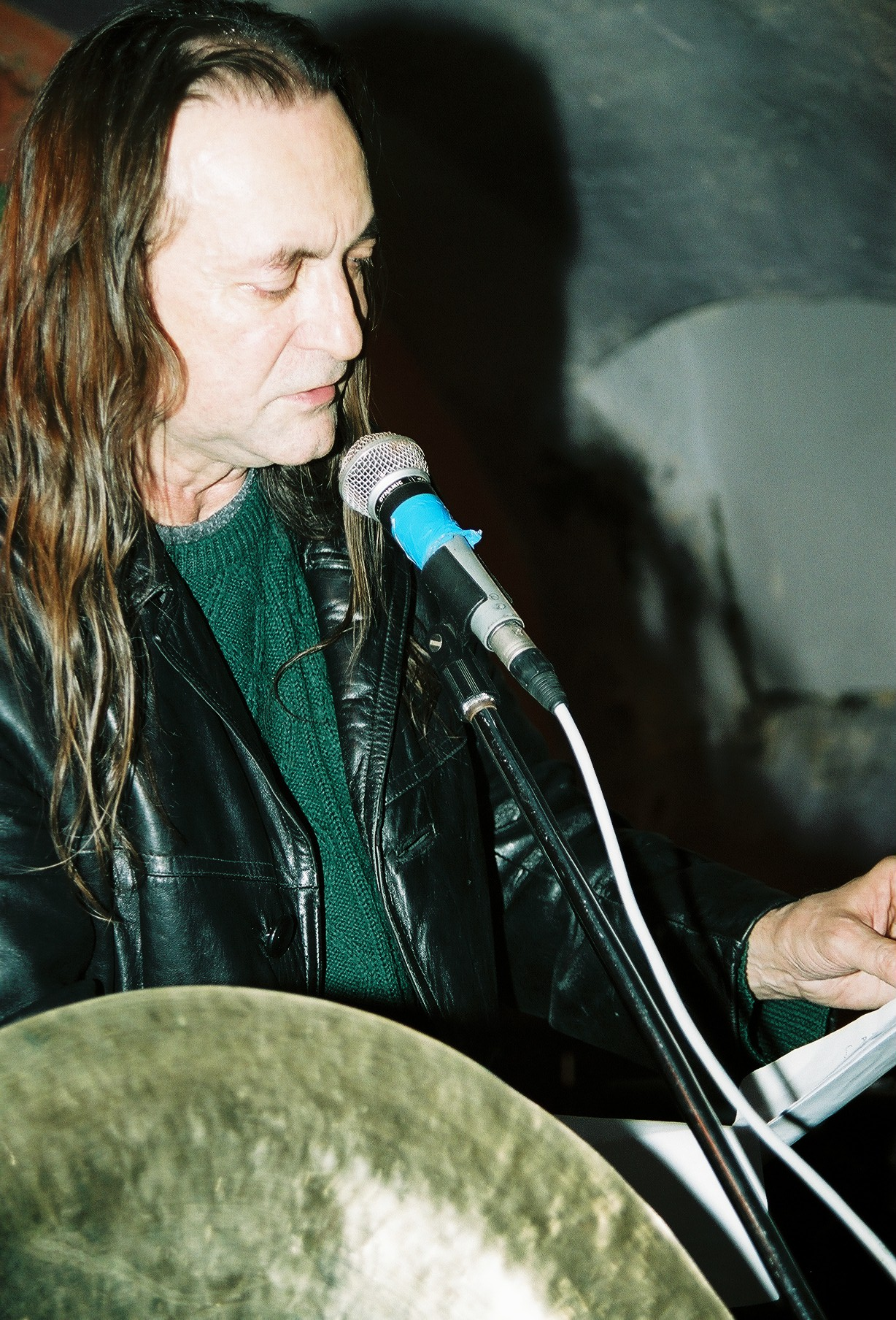 Jaroslav Erik Frič, club performance